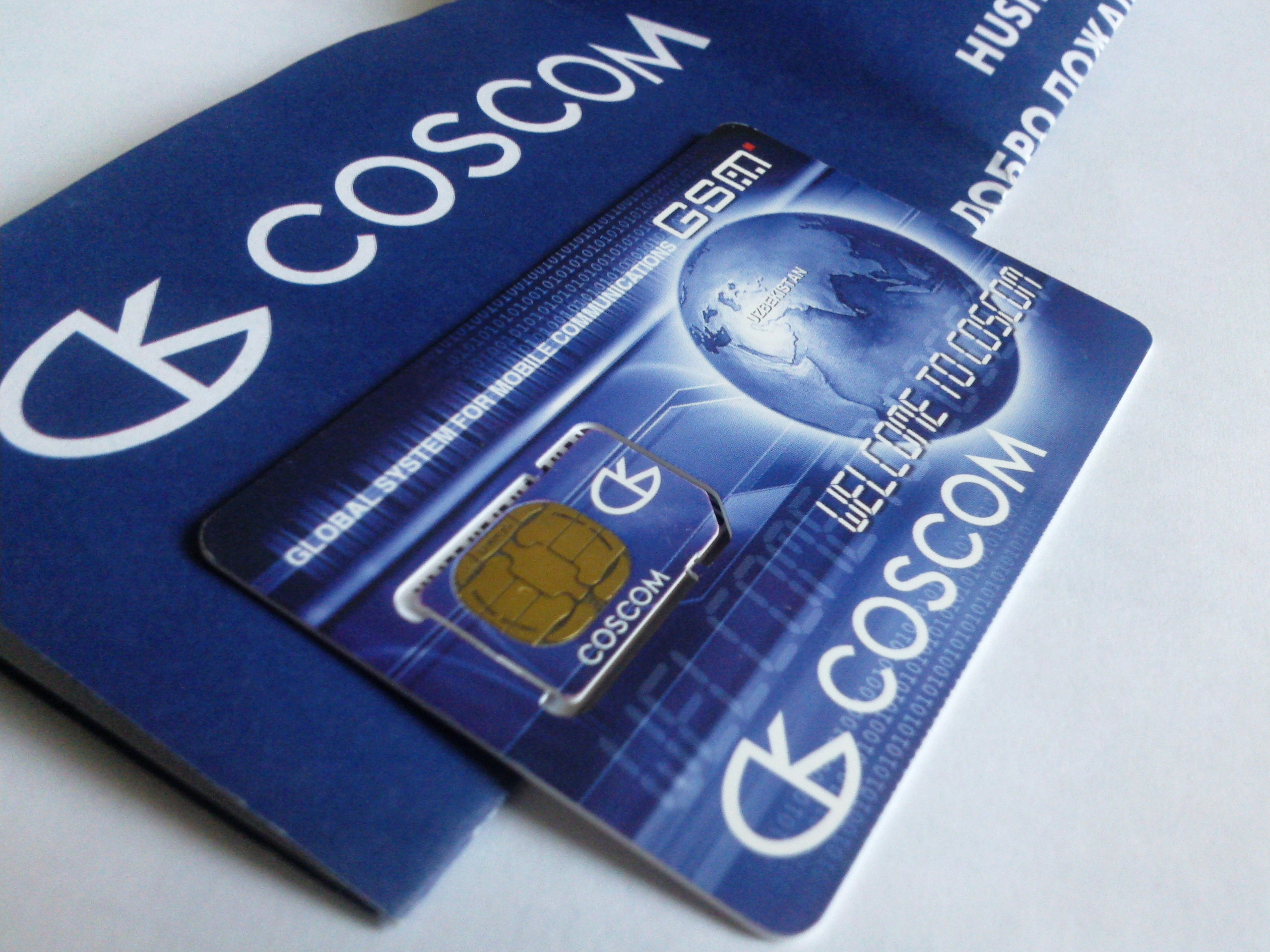 Это SIM карта OOO COSCOM с буклетом, содержащим PIN PUK и другую информацию. В настоящее время такие карты не выпускают.